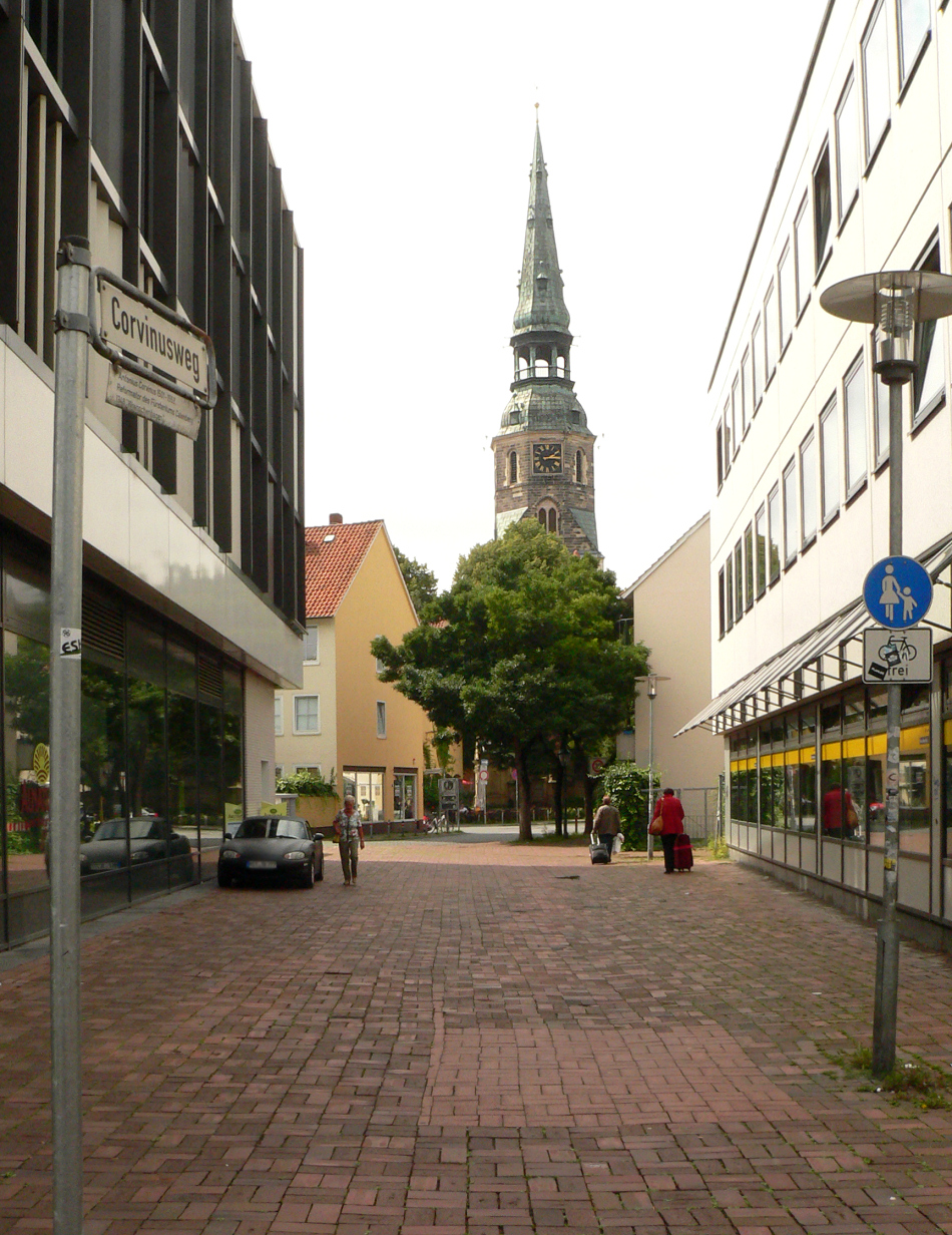 Corvinusweg in Hannover und Kreuzkirche